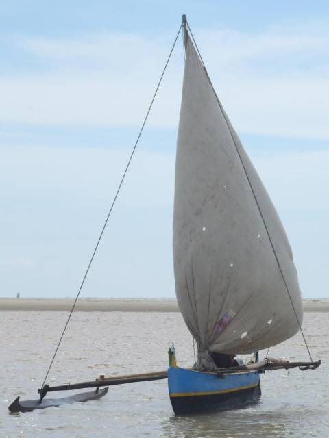 Fotografiert in Madagaskar, Belo sur Mer. Mehr zur Tour unter Bikeadventure.de